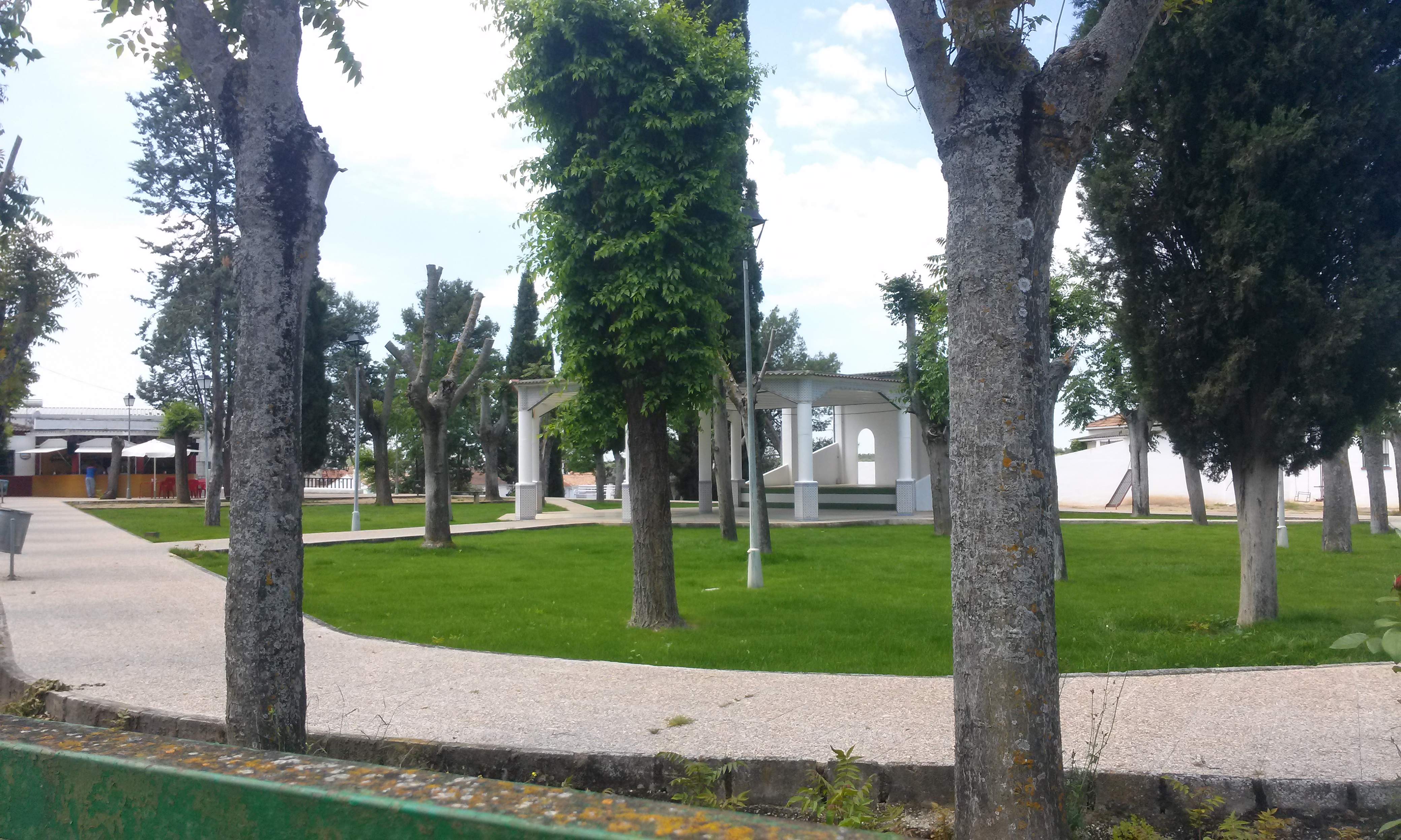 Parque municipal de Espelúy.